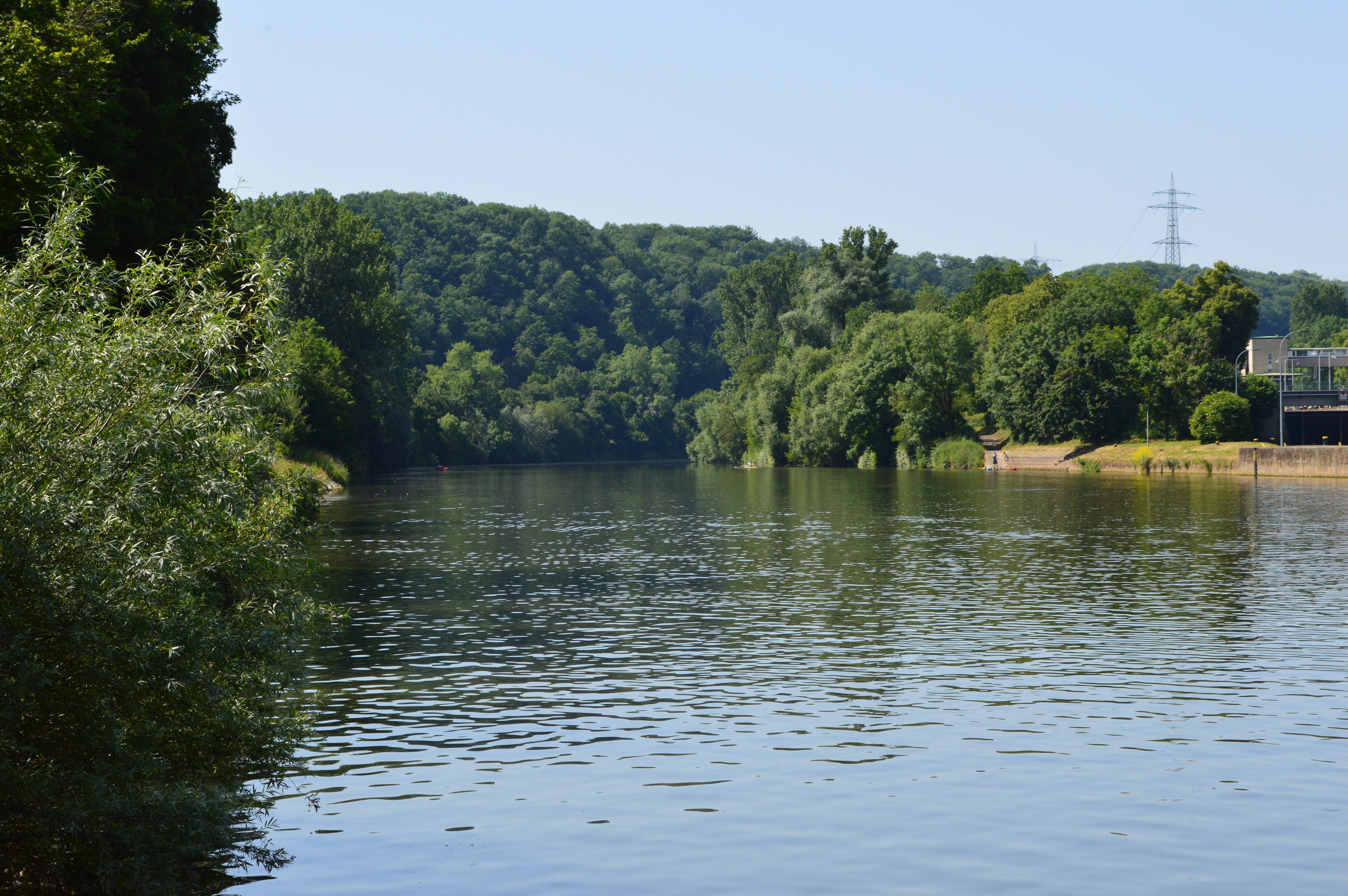 Der tote Arm des Neckars in Marbach im Landschaftsschutzgebiet des Neckartals nach der Marbacher Schleuse.